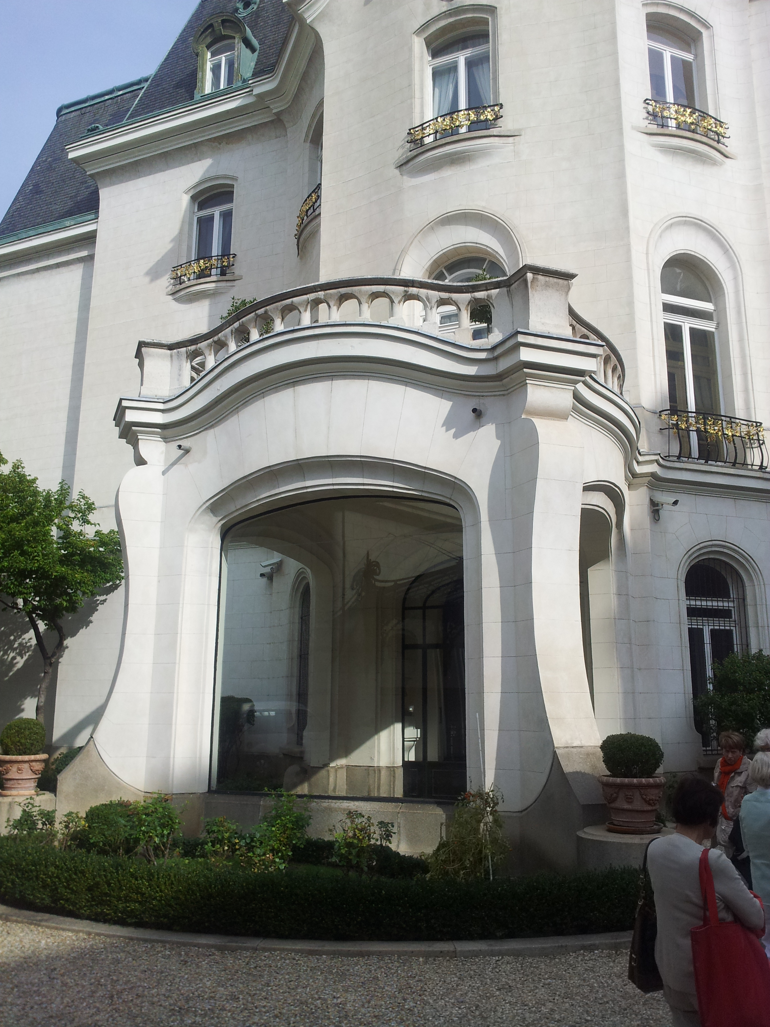 Französische Botschaft Dieses Bild wurde anlässlich des österreichischen Tags des Denkmals 2012 in Wien eingereicht.